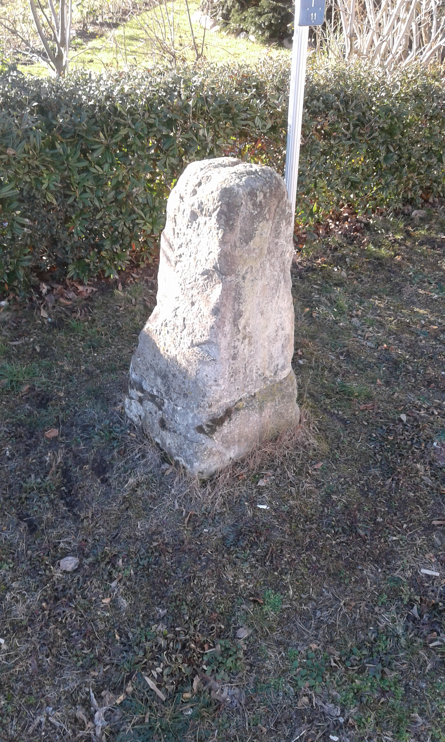 Wegweiser